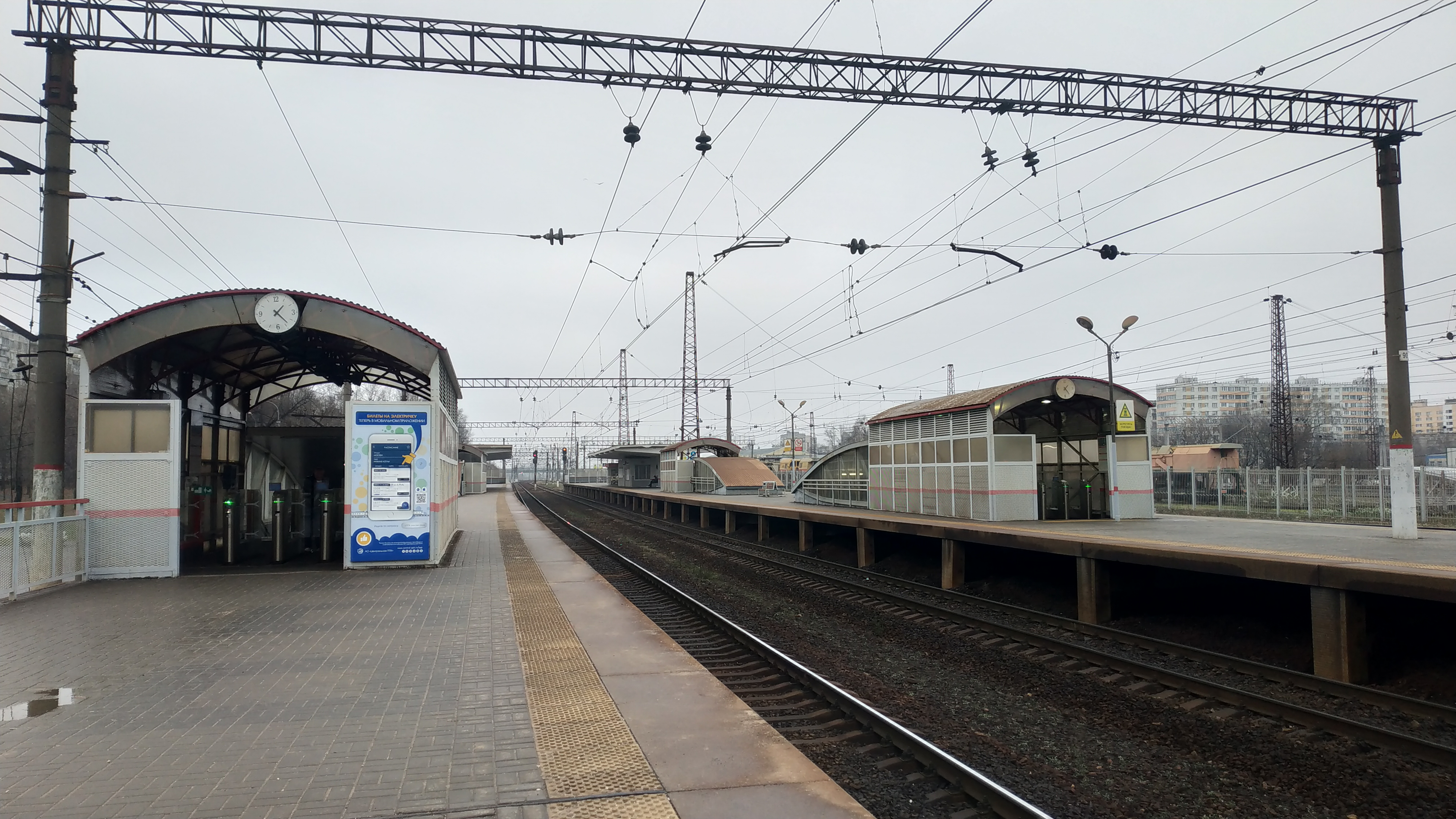 Бирюлёво-Товарная